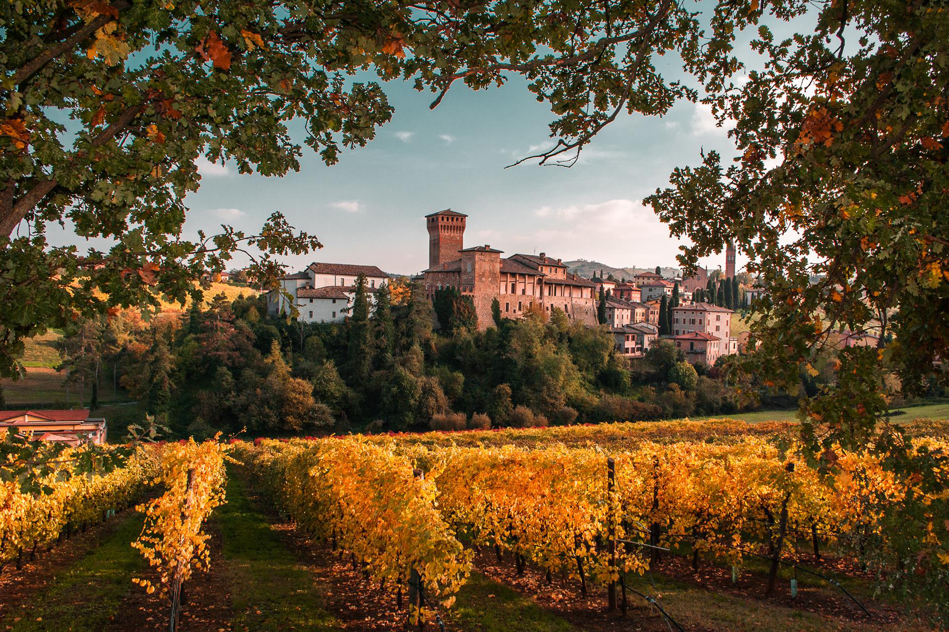 "L'esplosione" dell'autunno al Castello di Levizzano This is a photo of a monument which is part of cultural heritage of Italy.